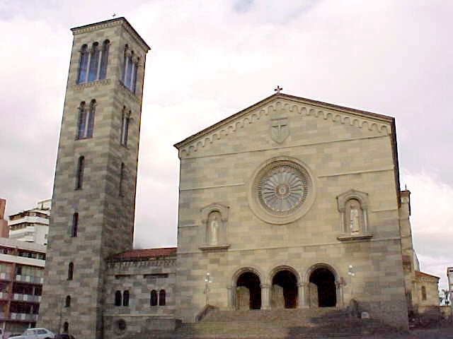 Iglesia de La Chiquinquira en el municipio Libertador, Distrito Capital - Venezuela 2000